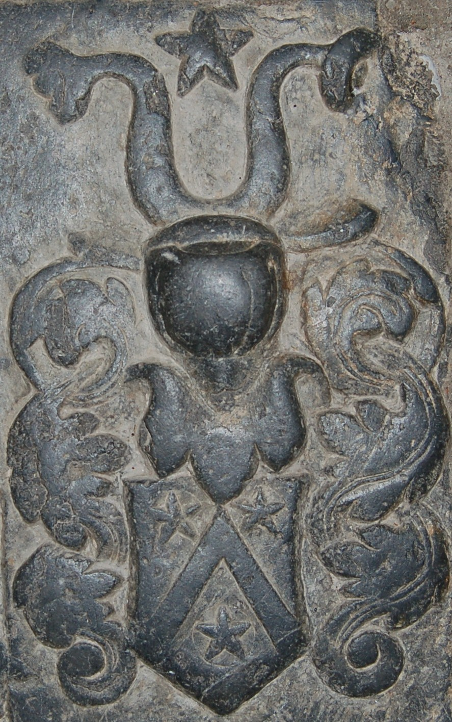 Galde / Galle gravstein Hedrum kirke